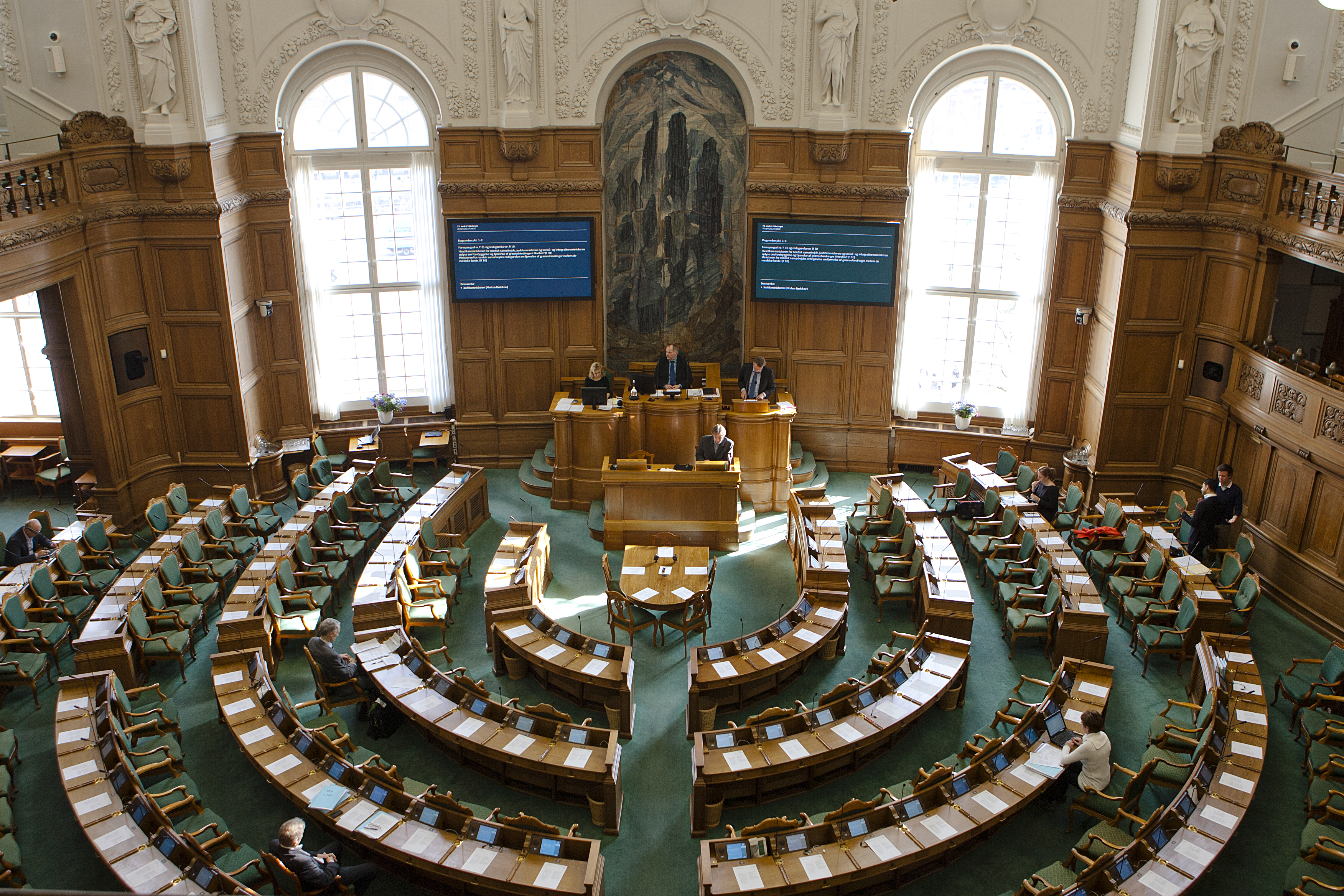 Folketingssalen i Christiansborg 20120420.